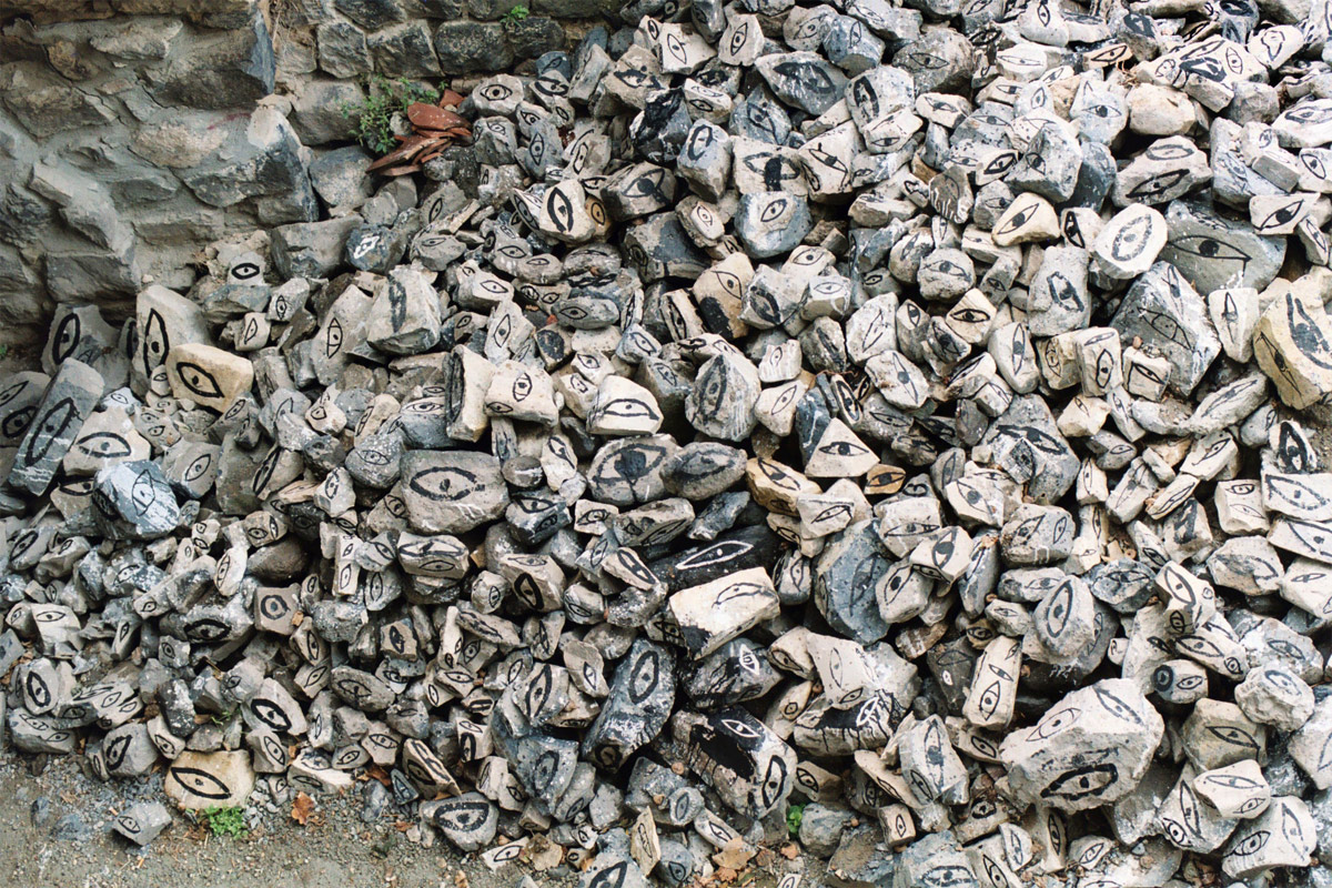 Bemalte Steine in Mirabel